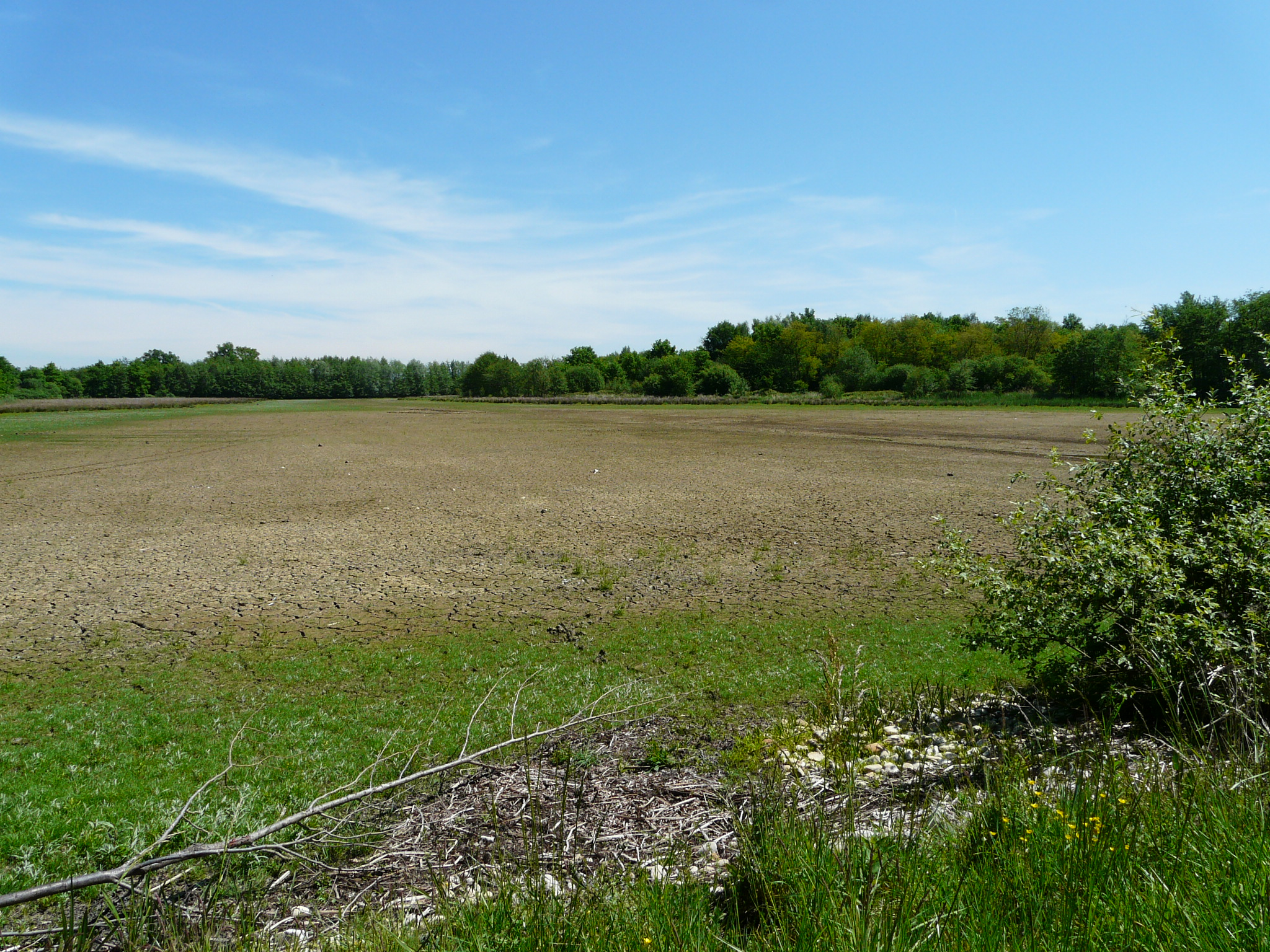 L'Etang Neuf en assec, près de Bouligneux dans la Dombes (France)